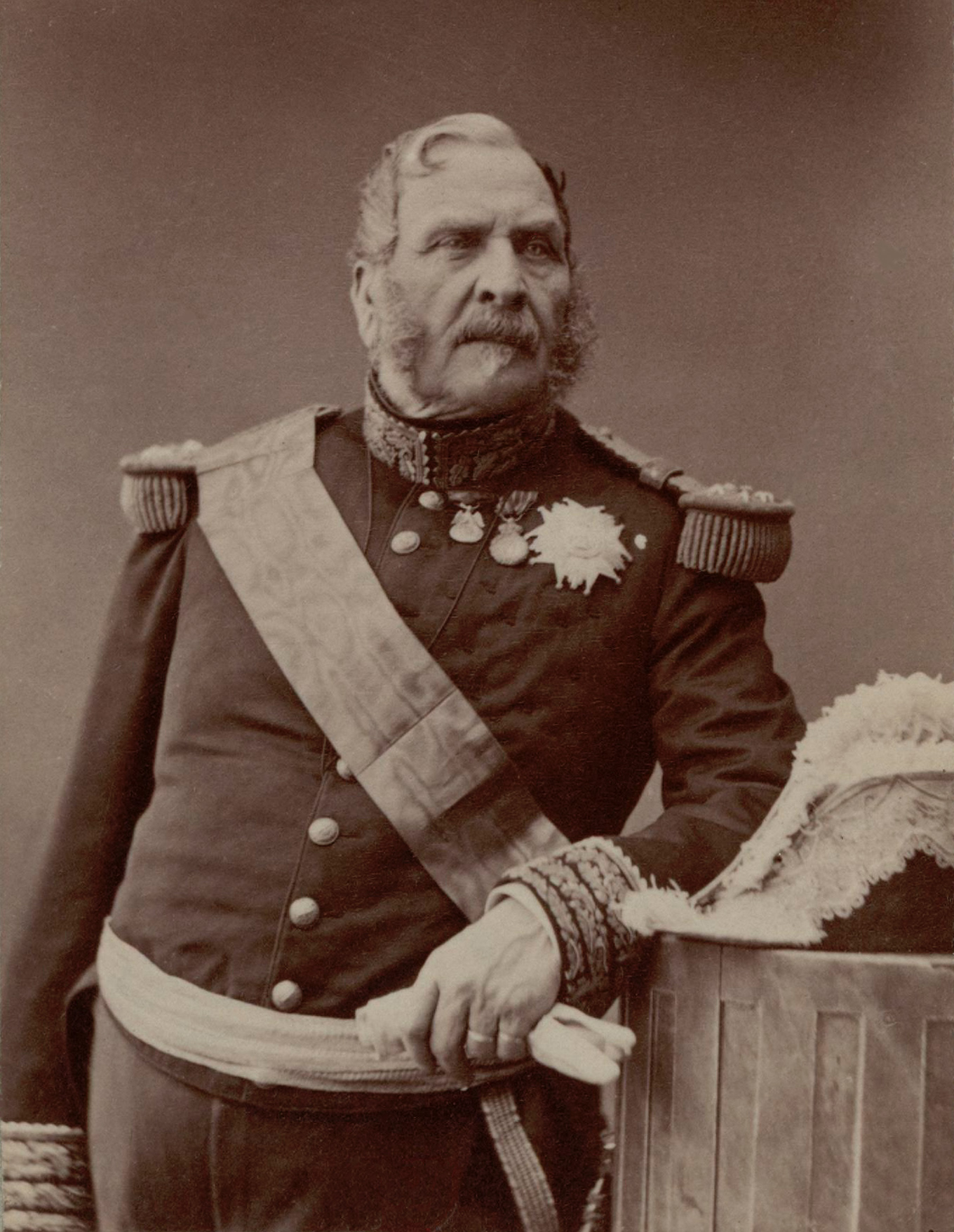 Le maréchal Bernard Pierre Magnan, photographie atelier Nadar.